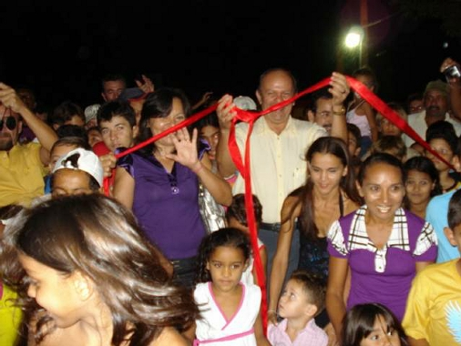 Inauguração realizada na emancipação politica de Janduís.